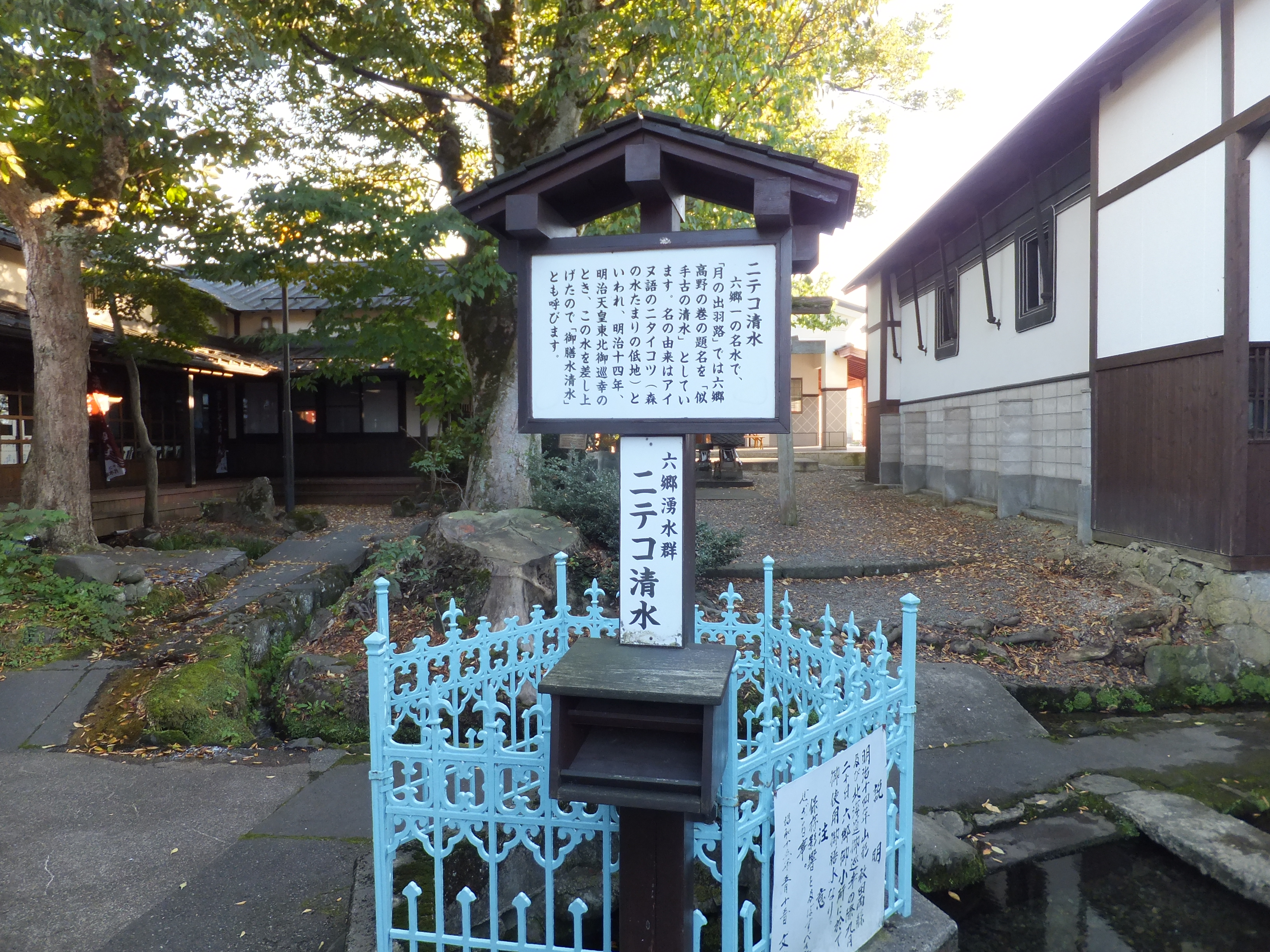 六郷の湧水、「ニテコ湧水」。明治天皇が行幸された際にも賞味された。